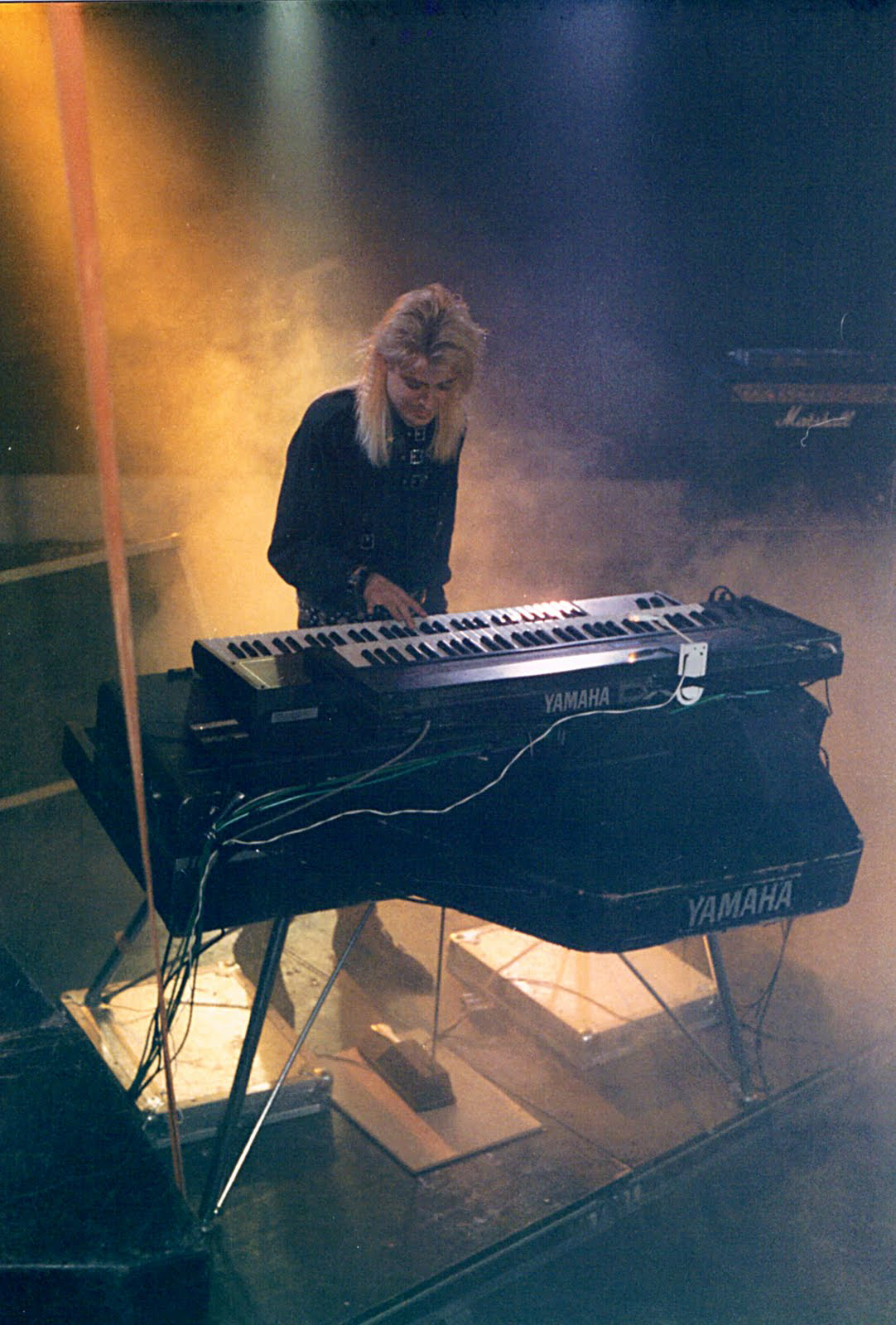 Comité Cisne en Barraca (1986).